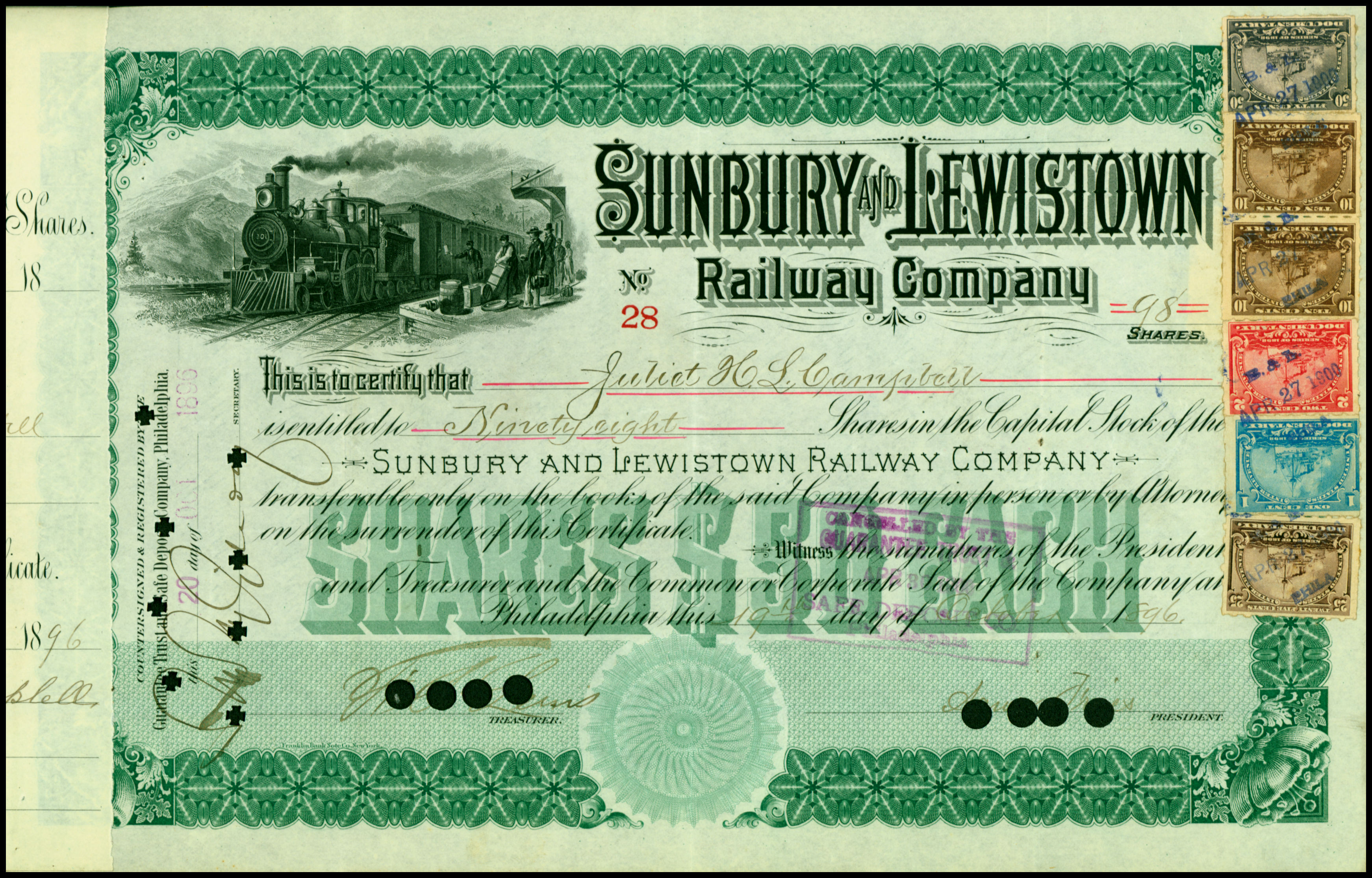 Aktie der Sunbury and Lewistown Railway Company vom 19. Oktober 1896